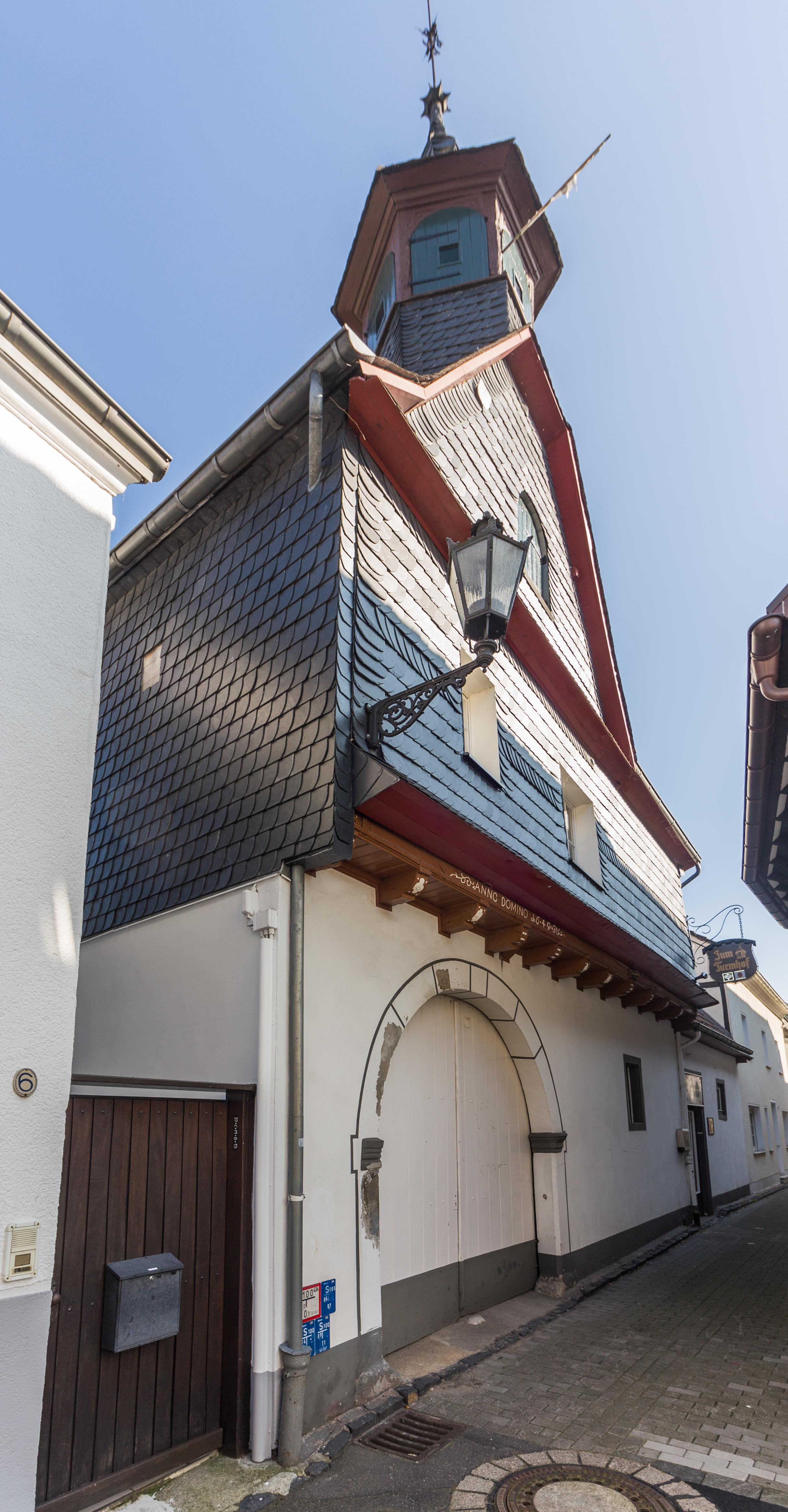 Turmhof, Turmstraße 4, Königswinter-Oberdollendorf This is a photograph of an architectural monument. 29